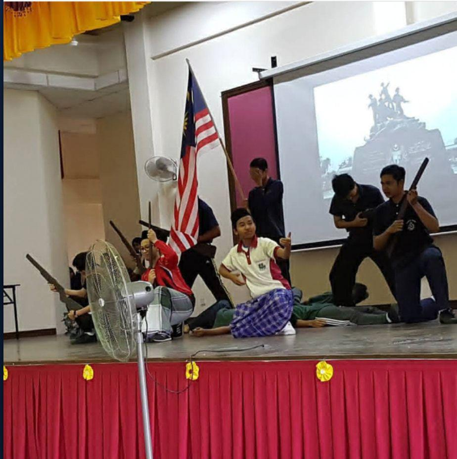 Pelajar melakonkan babak Hari Kemerdekaan